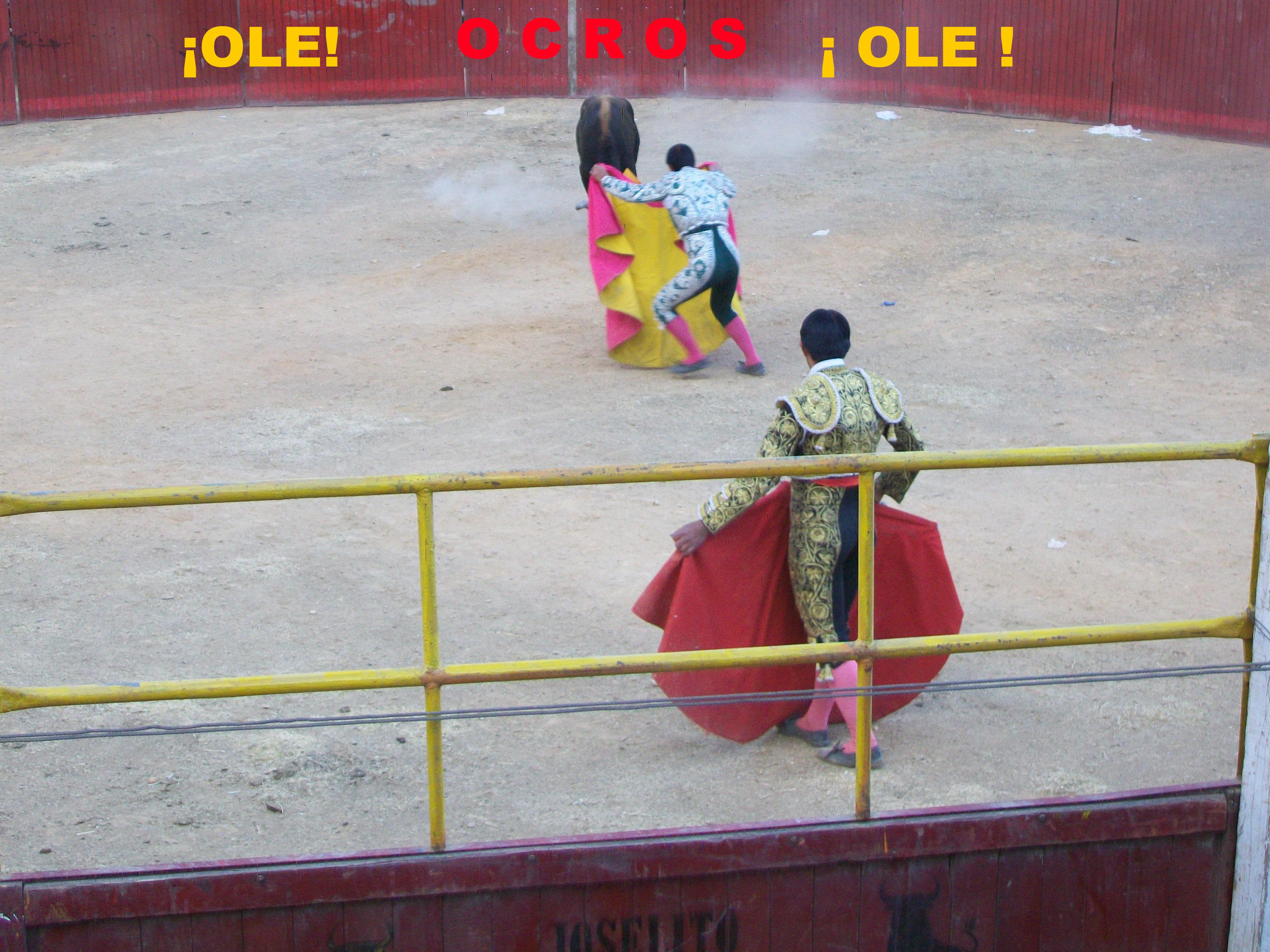 Corrida de toros en Pilluc (Ocros). País: Perú Fotógrafo:© Edgar Amador Espinoza Montesinos